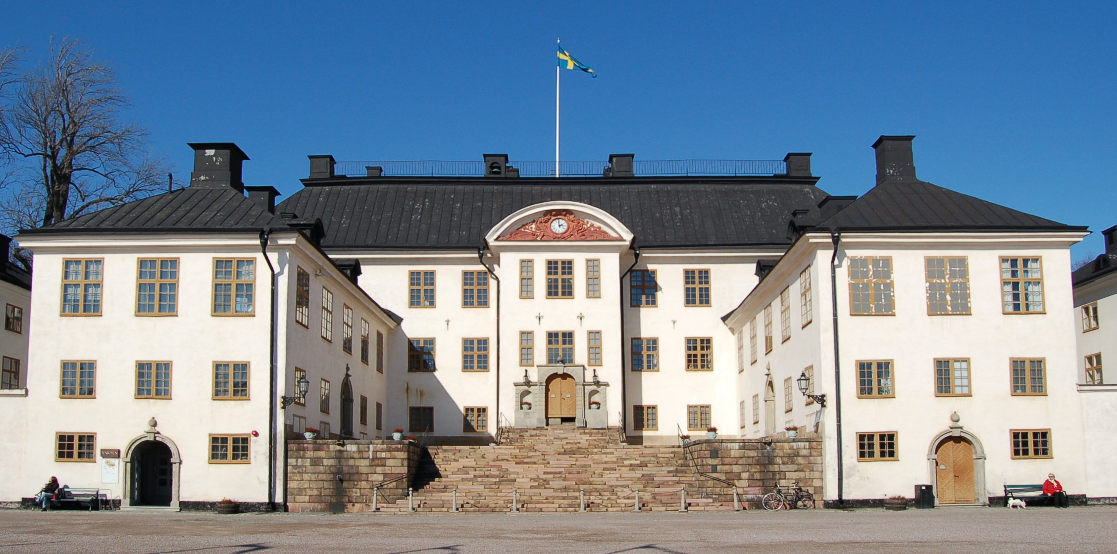 Karlbergs slott i Solna, huvudbyggnad